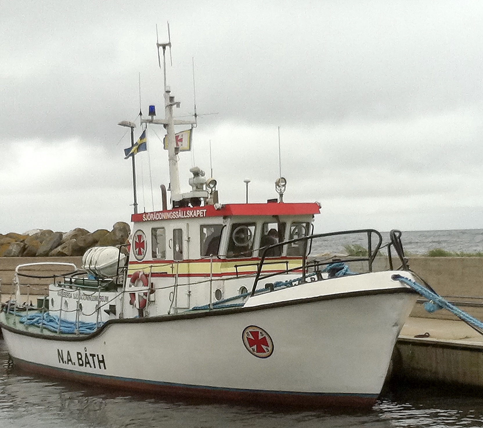 Räddningskryssaren N. A. Båth i Kåseberga hamn This is an image of the protected Swedish ship N. A. Båth, with call sign 13462 .